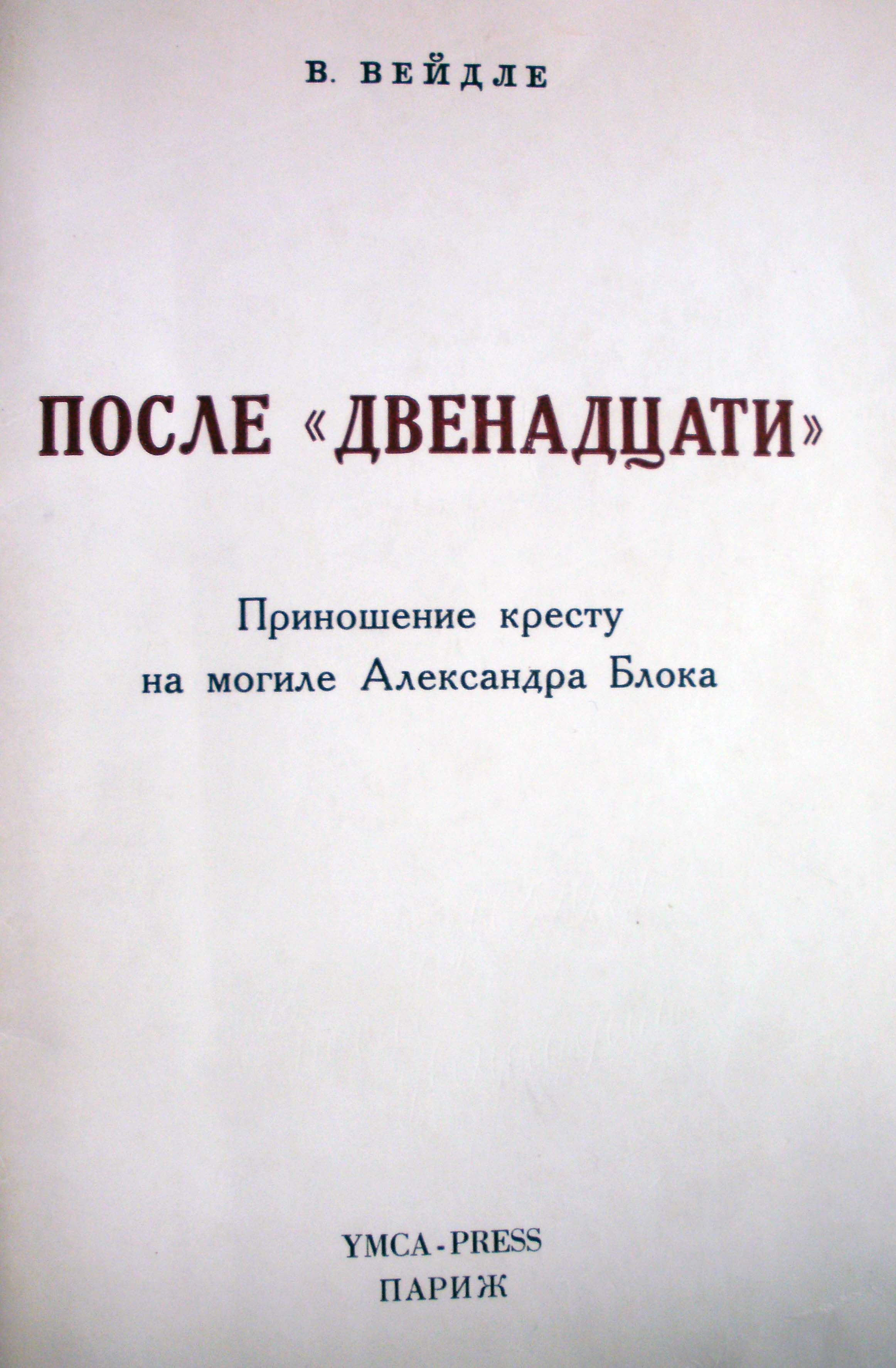 В. Вейдле - "После 12". YMCA press, 1973, Париж.